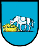 Herb Szałszy (gmina Zbrosławice, powiat tarnogórski, województwo śląskie, Polska)